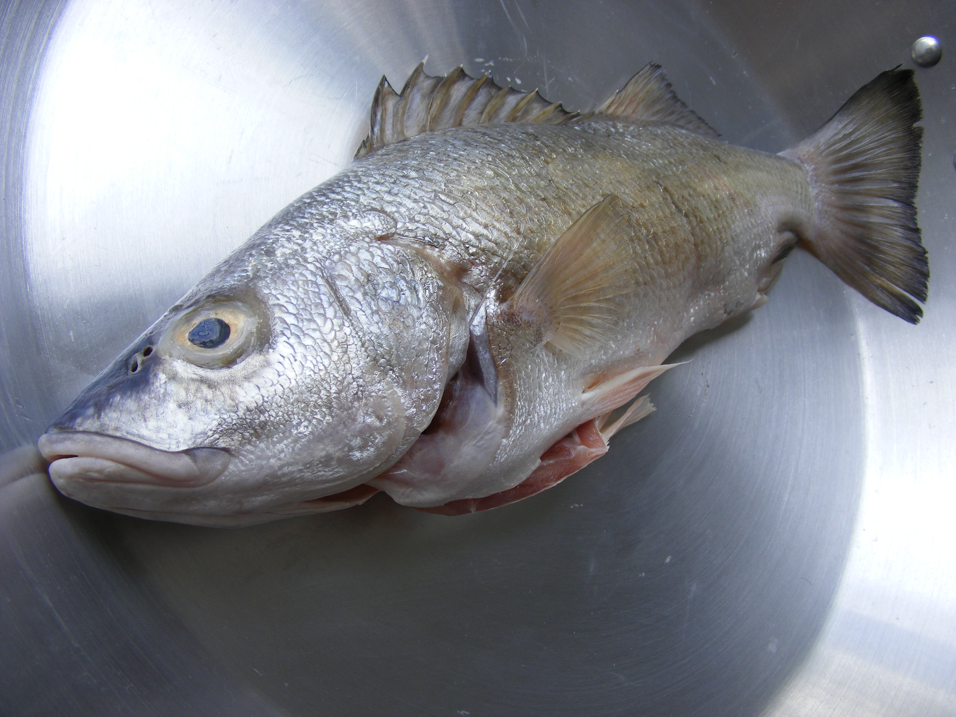 Pescado